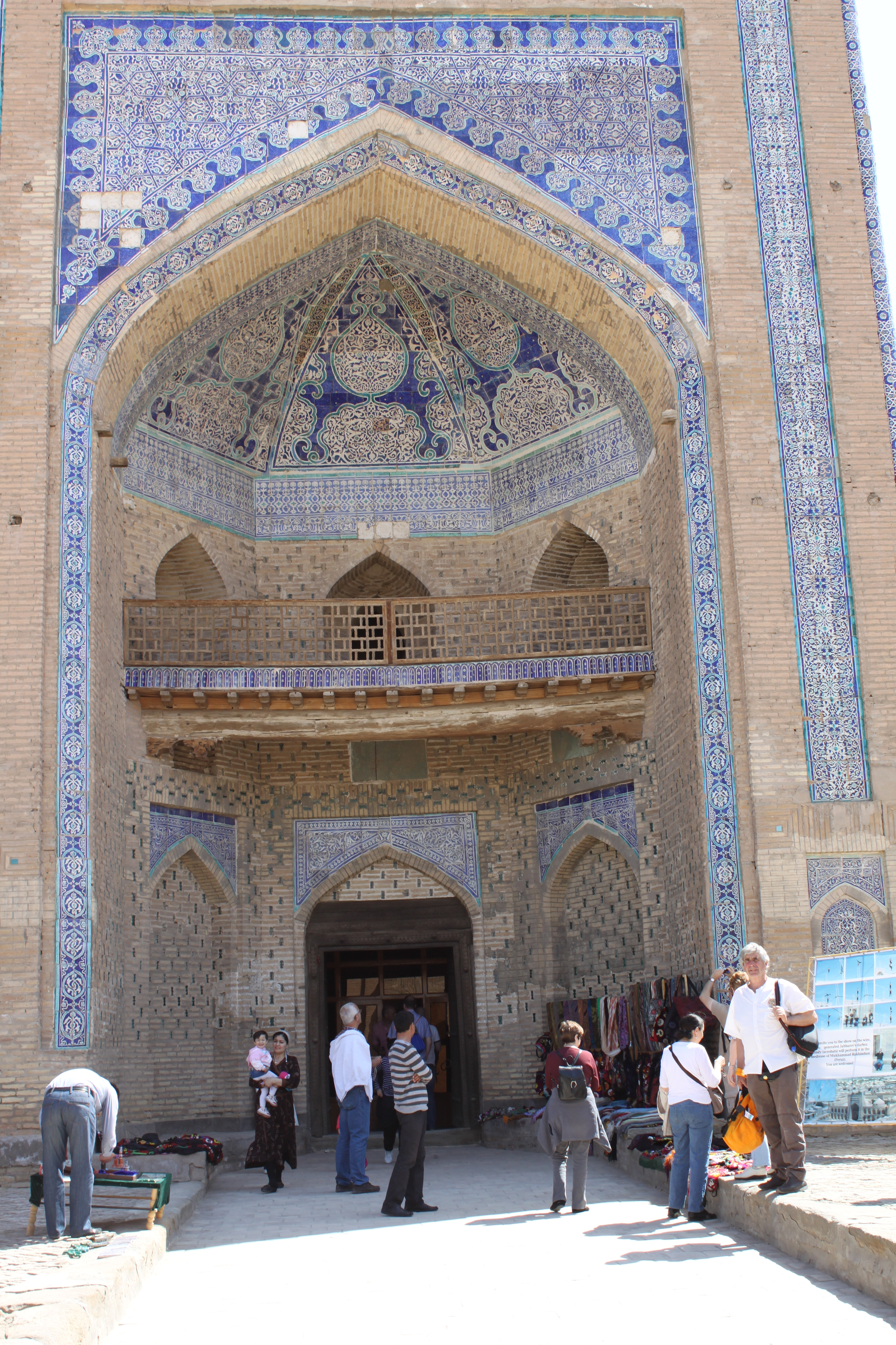 Portail de la Mohammed Rahim Khan madrasa